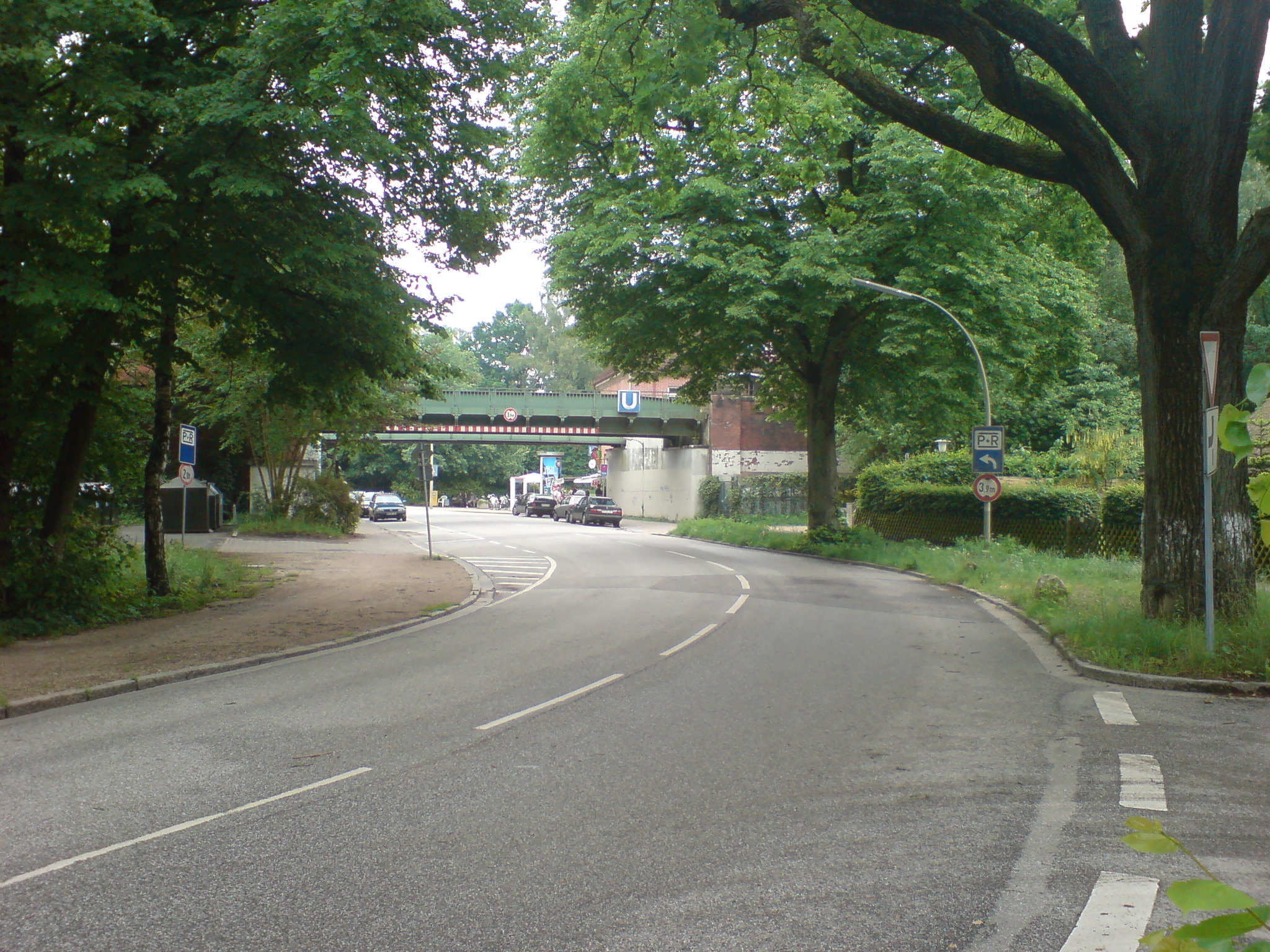 U-Bahnhof Ohlstedt (U1) in Hamburg-Ohlstedt